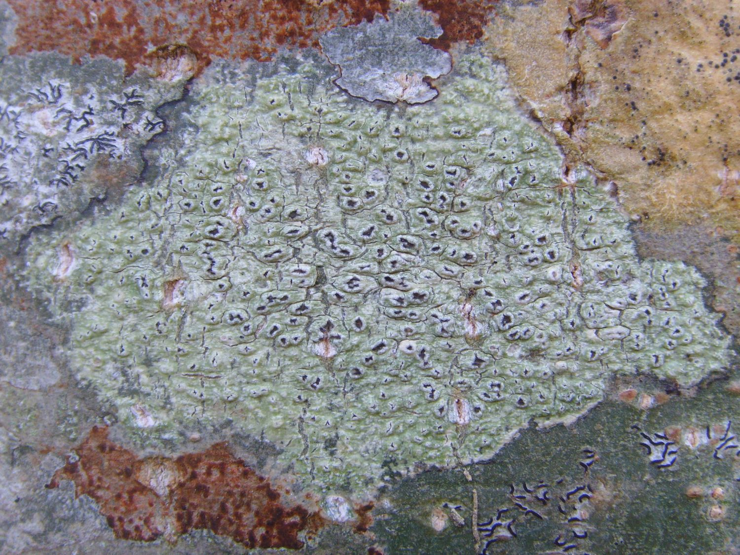 Pertusaria leioplaca, Pont Neuf - Pont Callec (Berné, Morbihan, Betagne, France)